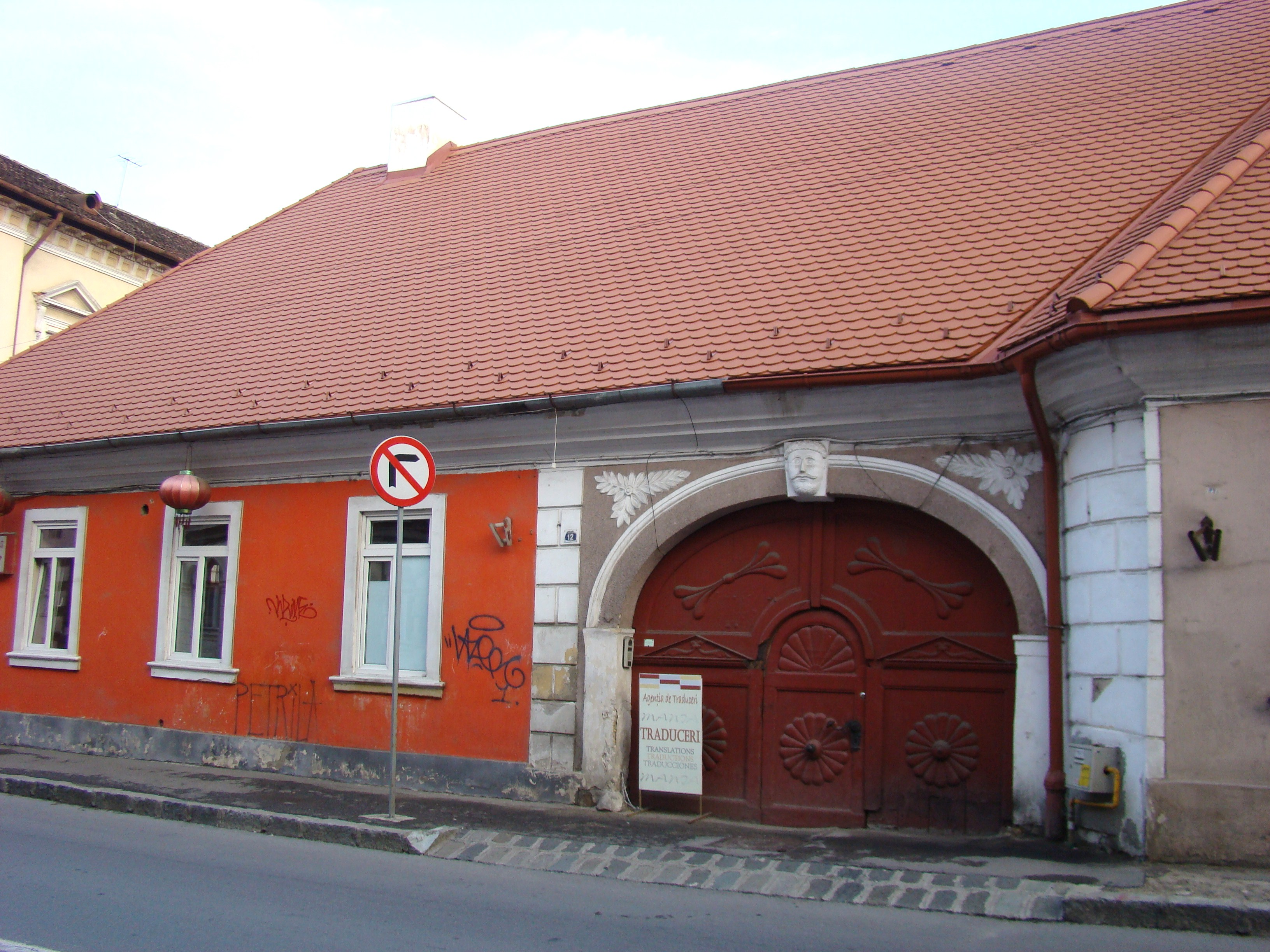 Casă monument istoric str.Avram Iancu, nr.12